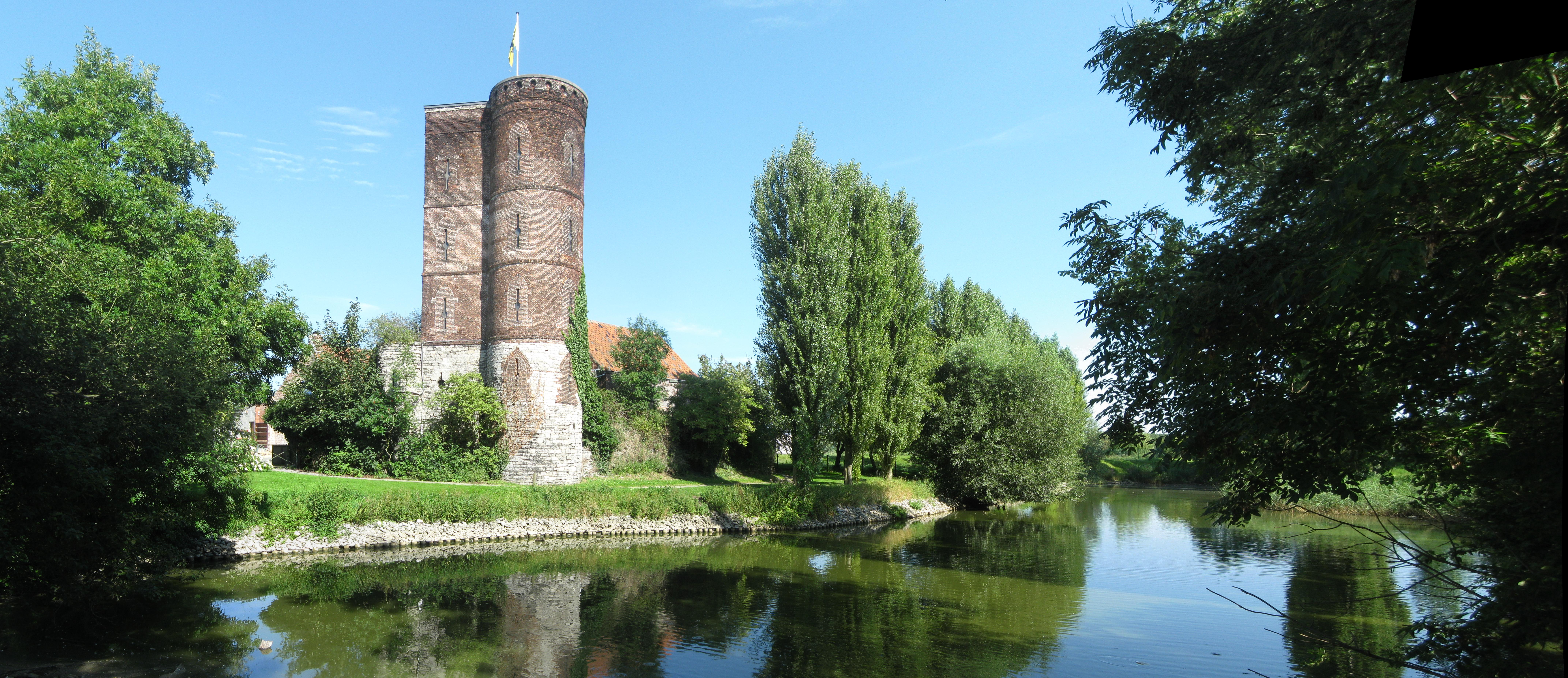 De Graventoren in Rupelmonde op een mooie zomerdag. De foto is een panorama-compositie van meerdere fotos genomen op hetzelfde moment om het geheel (monument+natuur) in waarde te stellen.